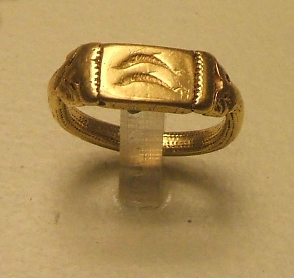 Cádiz anillo fenicio de Casa del Obispo. Siglo VII a. C. Museo de Cádiz.